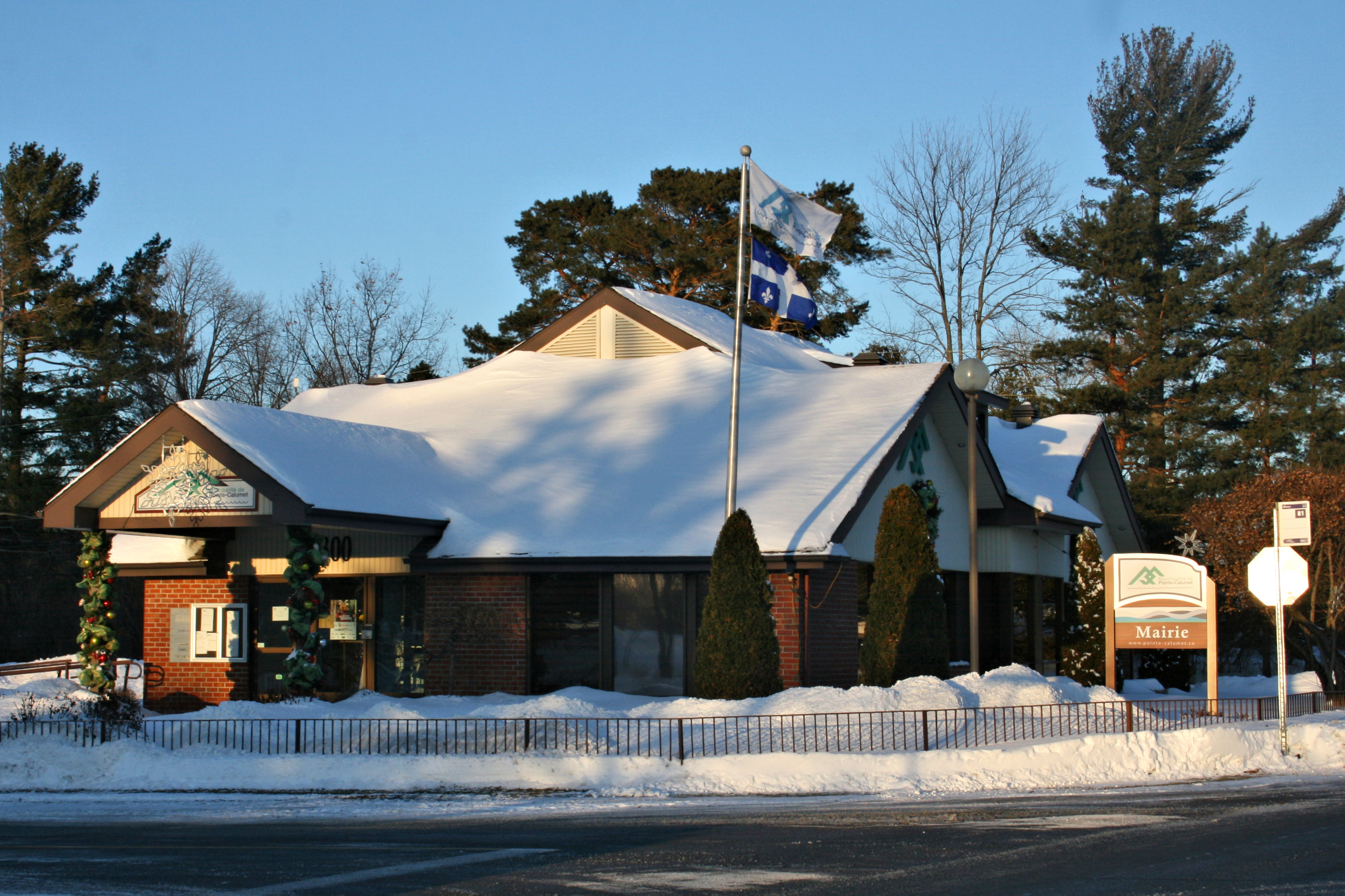 Pointe-Calumet, Quebec, Canada